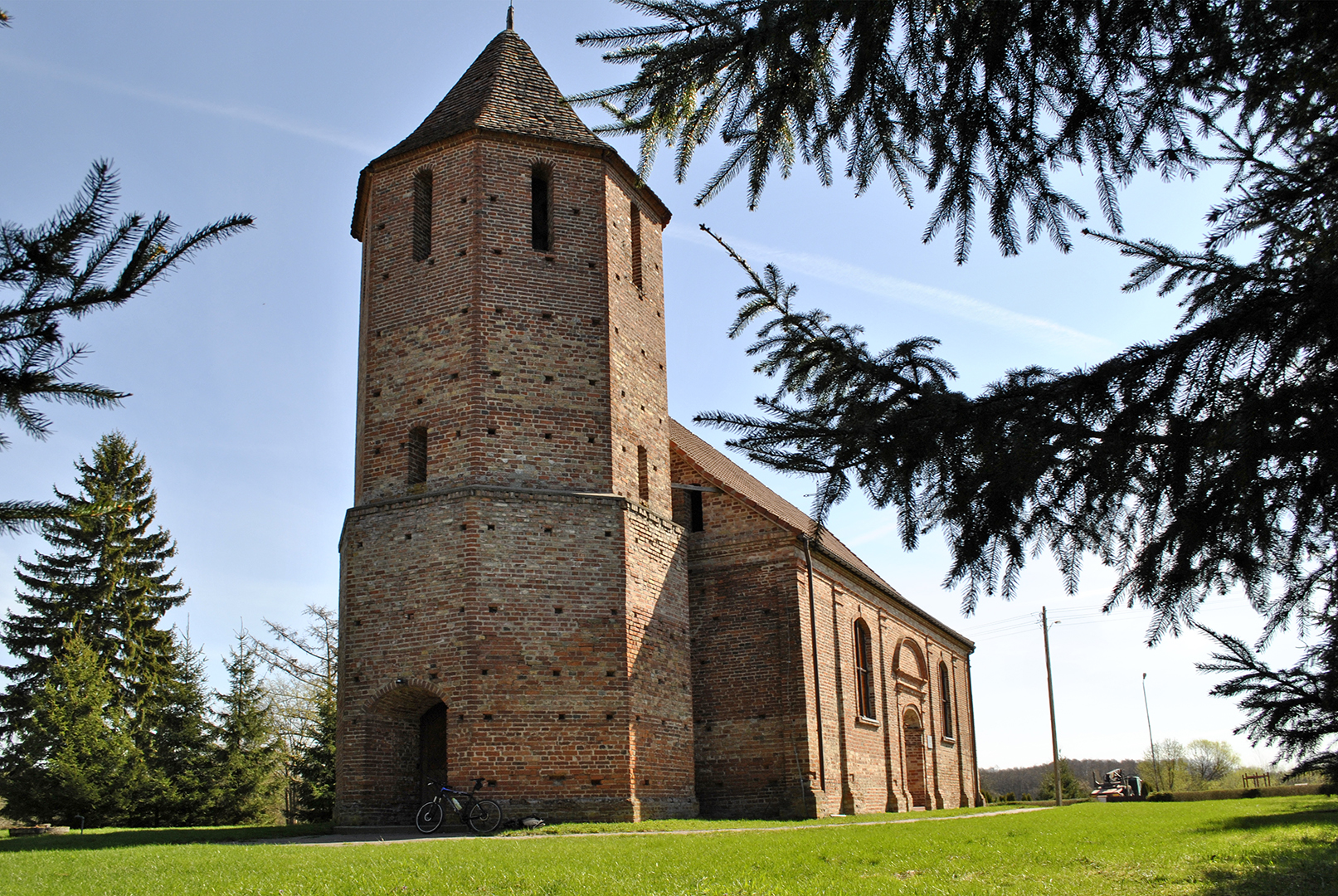 Strzmiele - kościół filialny pw. NMP i św. Andrzeja z 1722 roku